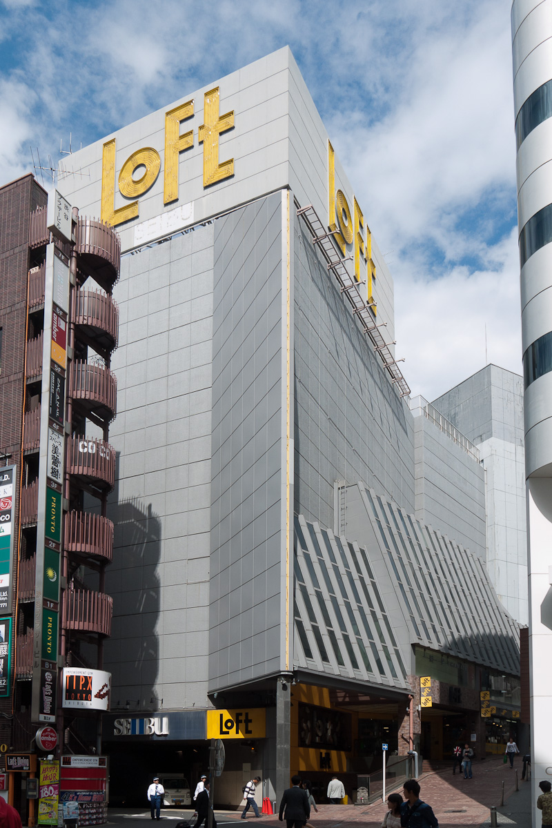 渋谷Loft、東京都渋谷区宇田川町。